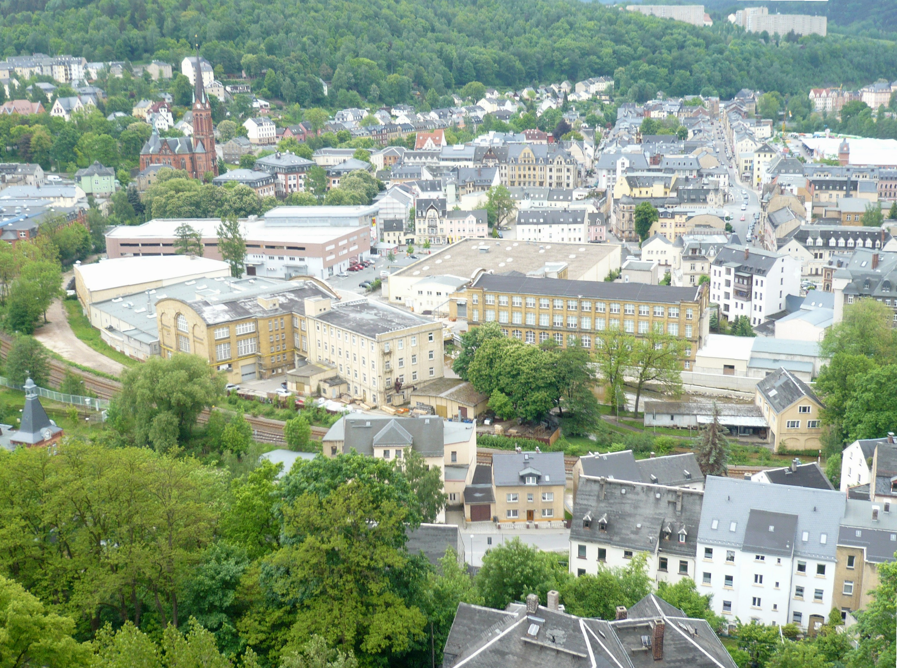 Blick von der Friedenskirche auf das Zentrum von Aue: die Werksanlagen der Weberei Curt Bauer